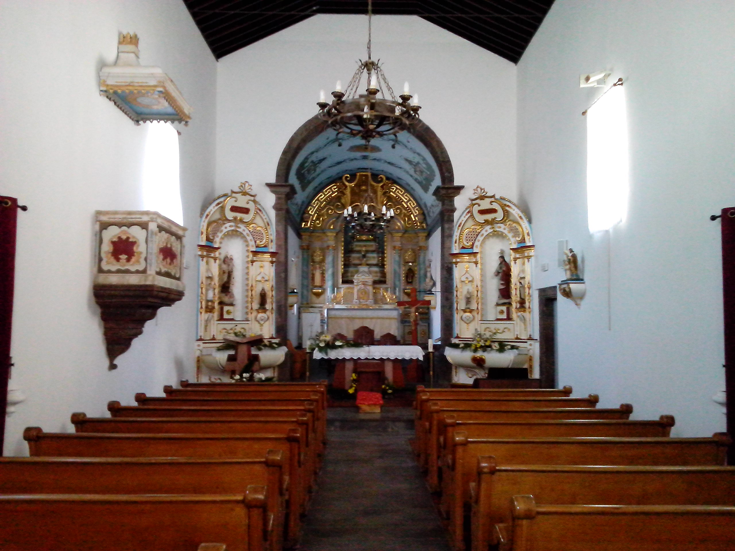 Ilha do Corvo, Igreja de Nossa Senhora dos Milagres, Arquivo de Villa Maria, ilha Terceira, Açores